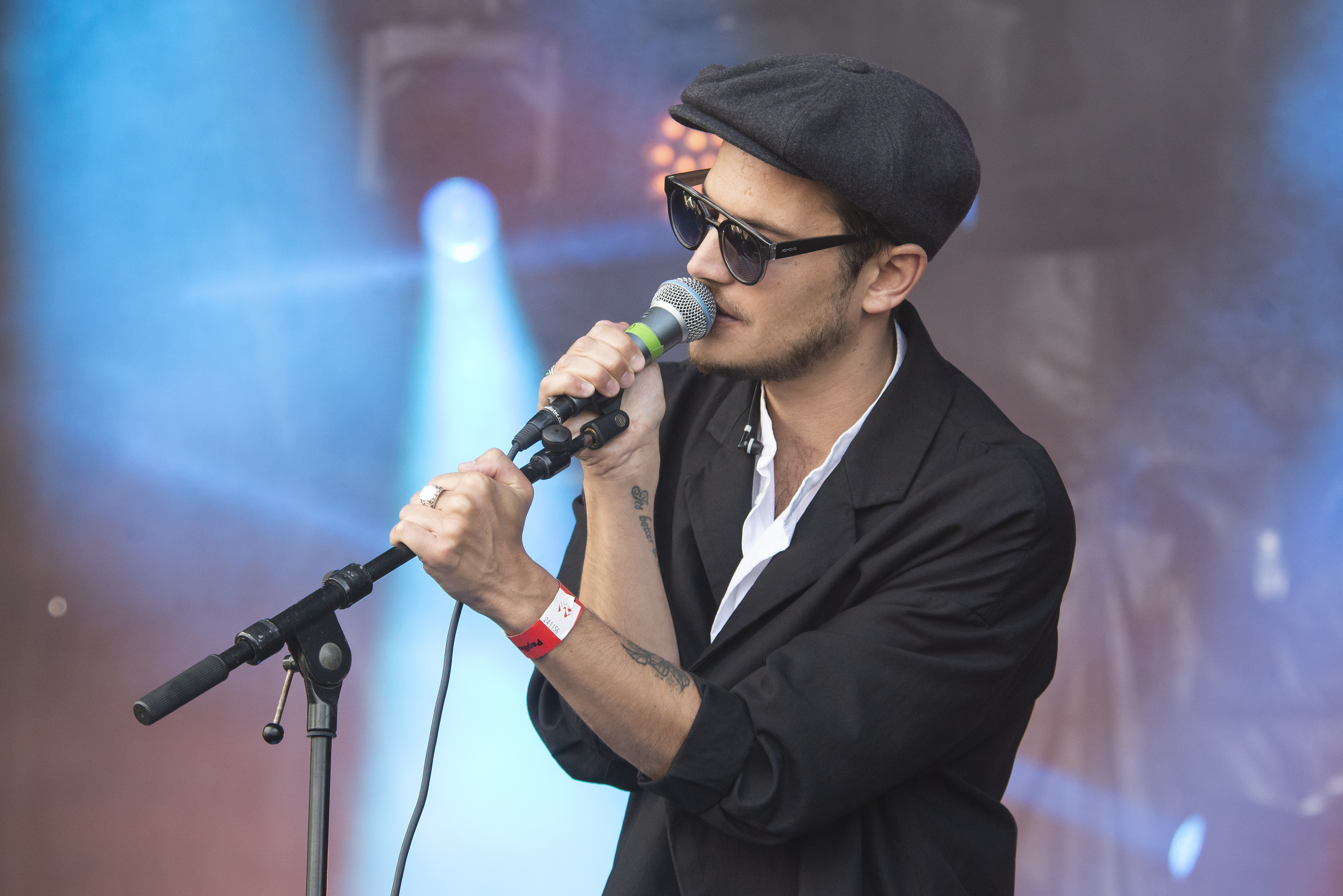 Concert du groupe The Slow Show au festival Papillons de nuit 2019 à Saint-Laurent de Cuves, Manche, Normandie.